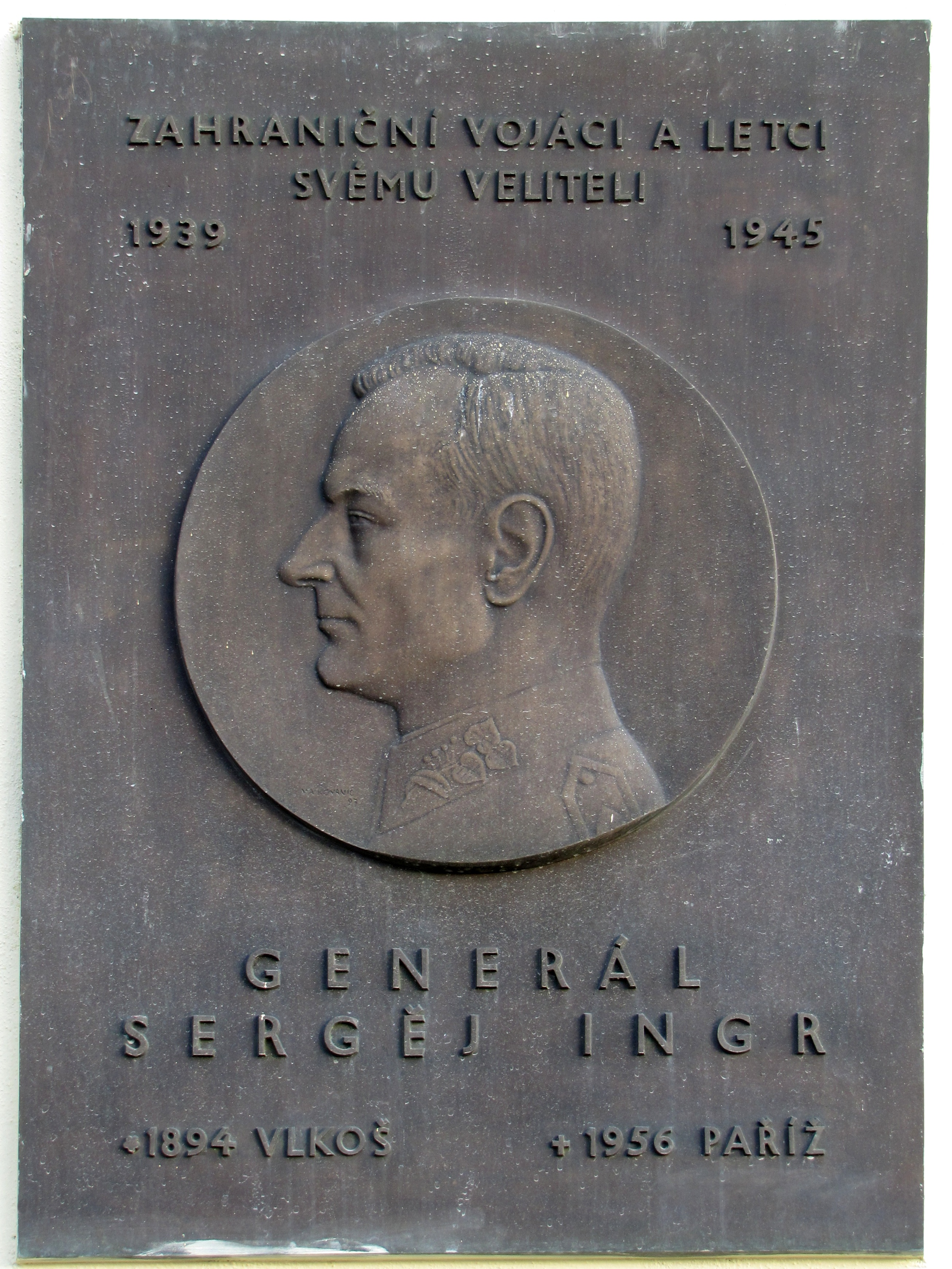 Pamětní deska generála Sergěje Ingra na Obecním úřadu ve Vlkoši, okres Hodonín. Vytvořil V. A. Kovanič v roce 1997